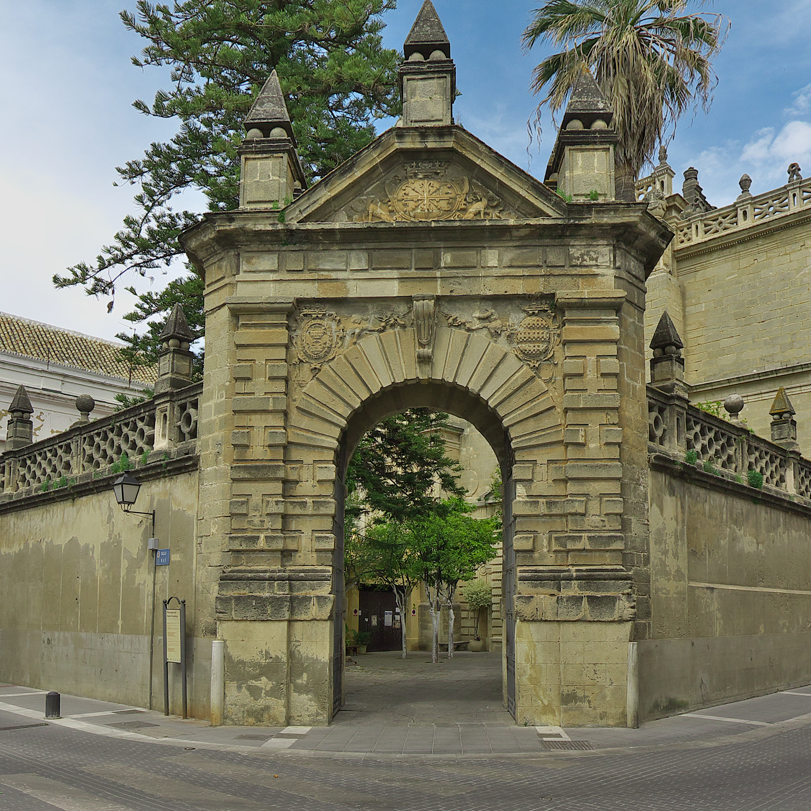 Portada del compás de la iglesia. Leonor Manrique de Sotomayor y Zúñiga y su esposo Juan Claros Pérez de Guzmán y Aragón (+1556), VII conde de Niebla patrocinan la construcción de la Iglesia de Santo Domingo (Sanlúcar de Barrameda). Cristóbal de Rojas es el autor de la portada del compás (1606).